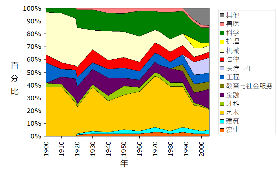 20世纪悉尼大学各院系学生数统计图中文简体版。（英文版 中文繁体版）